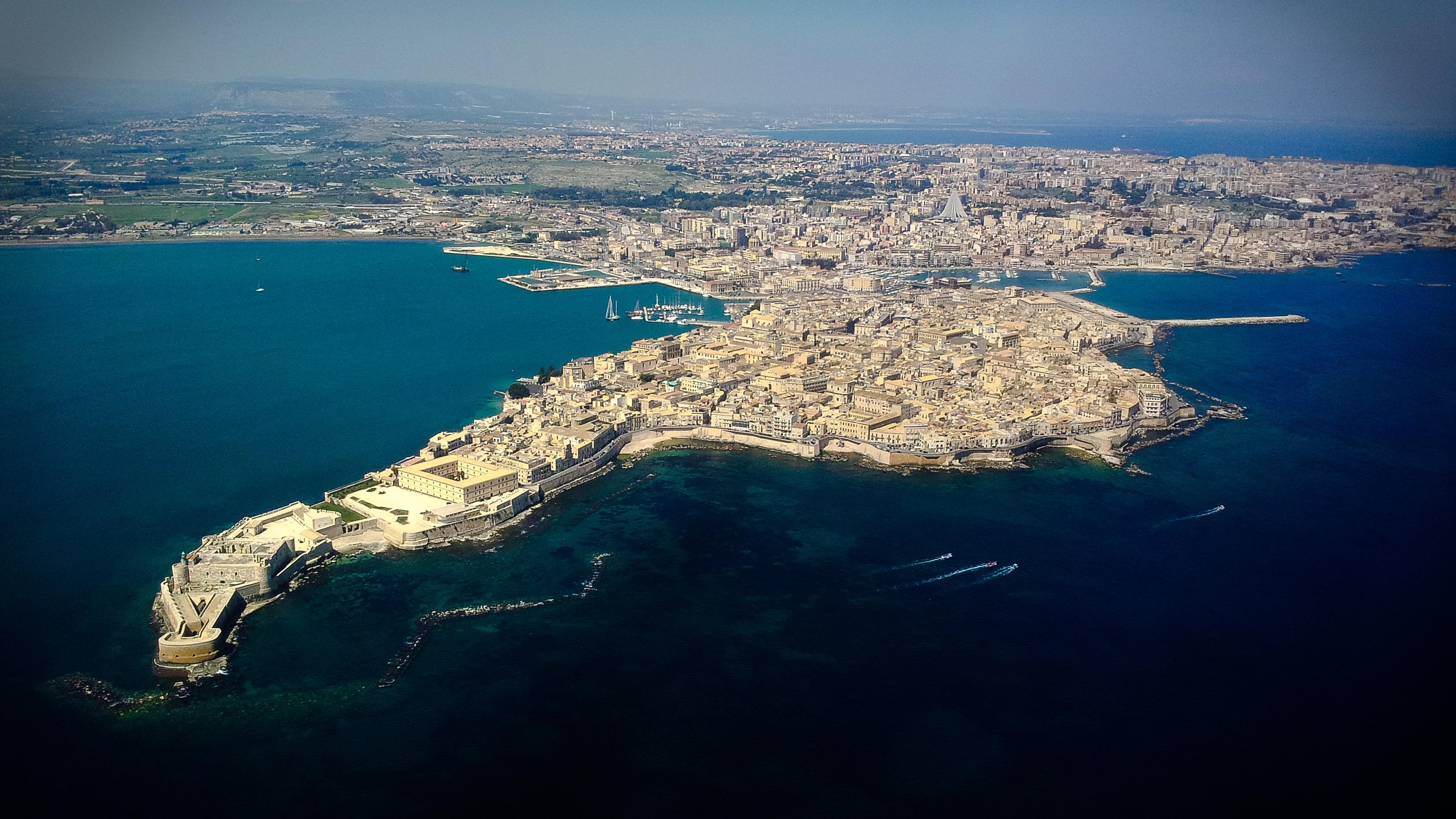 L'isola di Ortigia (Siracusa)